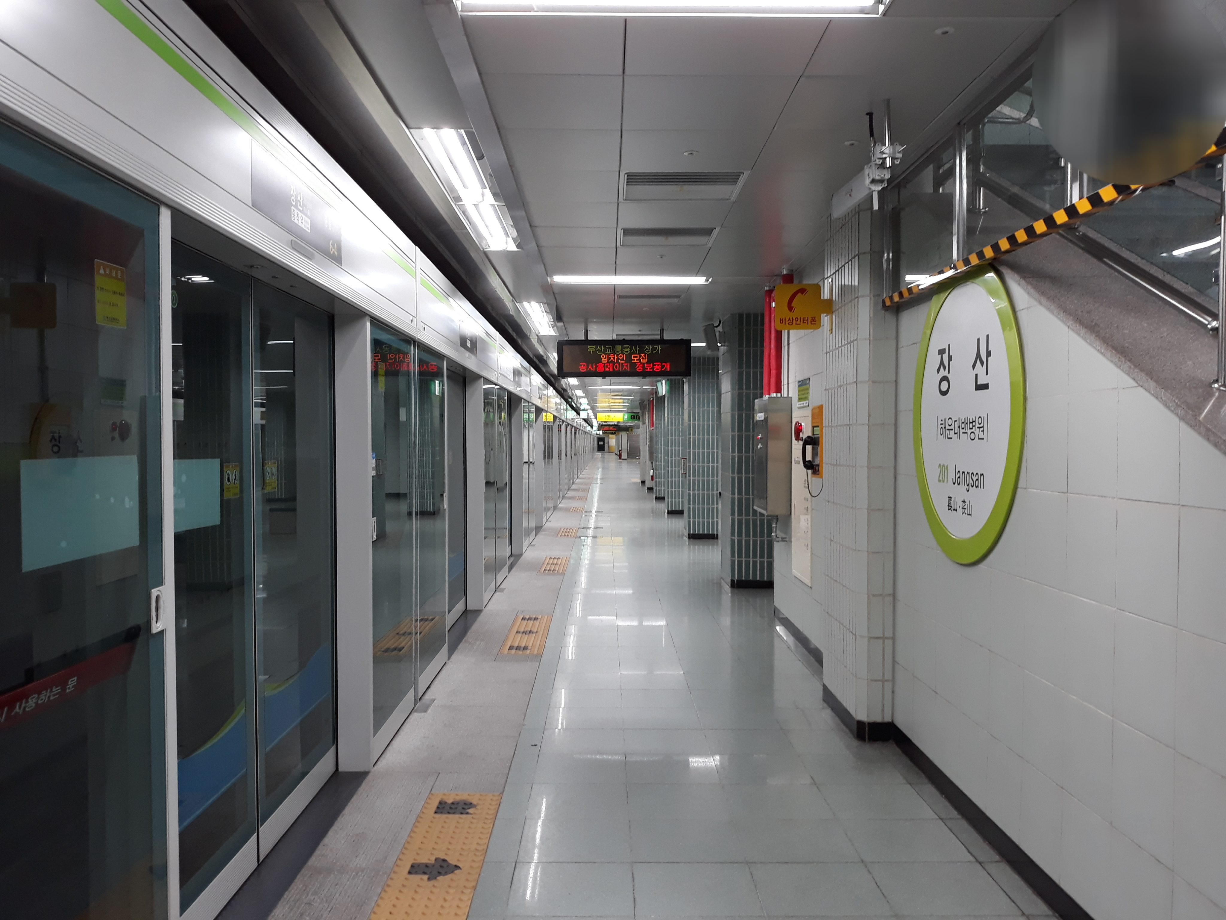 부산 도시철도 2호선 장산역 당역 종착 승강장